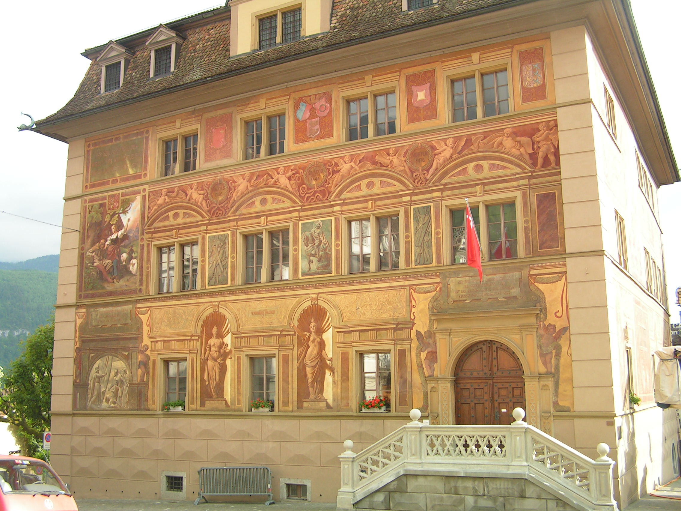 Rathaus Schwyz (Kantonsratsgebäude)